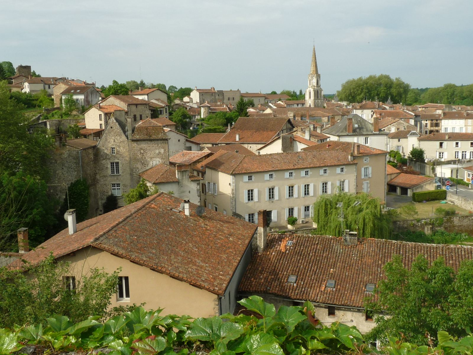 vue de Confolens (Charente, France) depuis la colline Ste-Catherine